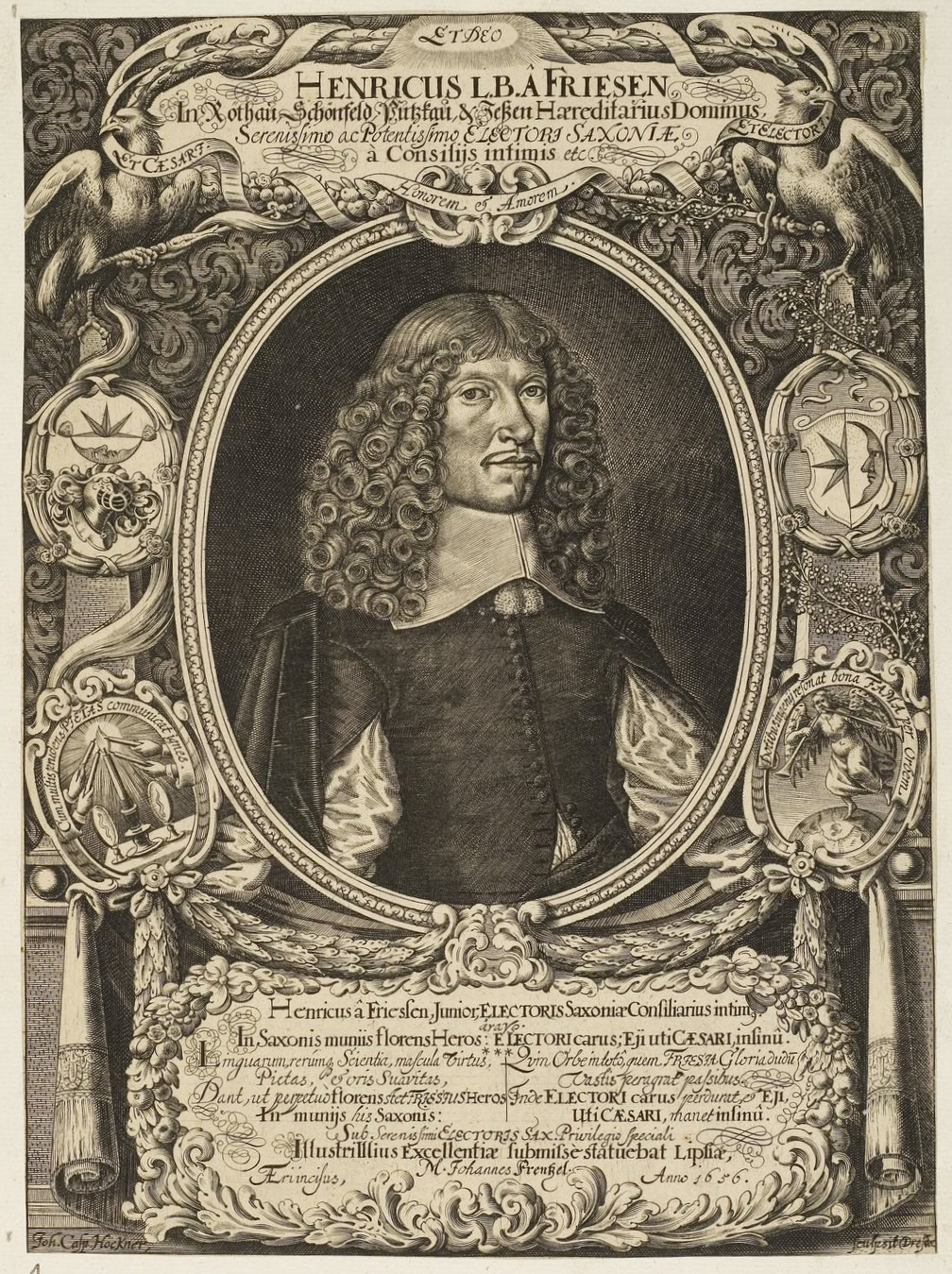 Grafik aus dem Klebeband Nr. 1 der Fürstlich Waldeckschen Hofbibliothek Arolsen Motiv: Heinrich von Friesen (1610–1680), Kursächs. Direktor des Geheimen Rats und Kammerherr GND: 122598792